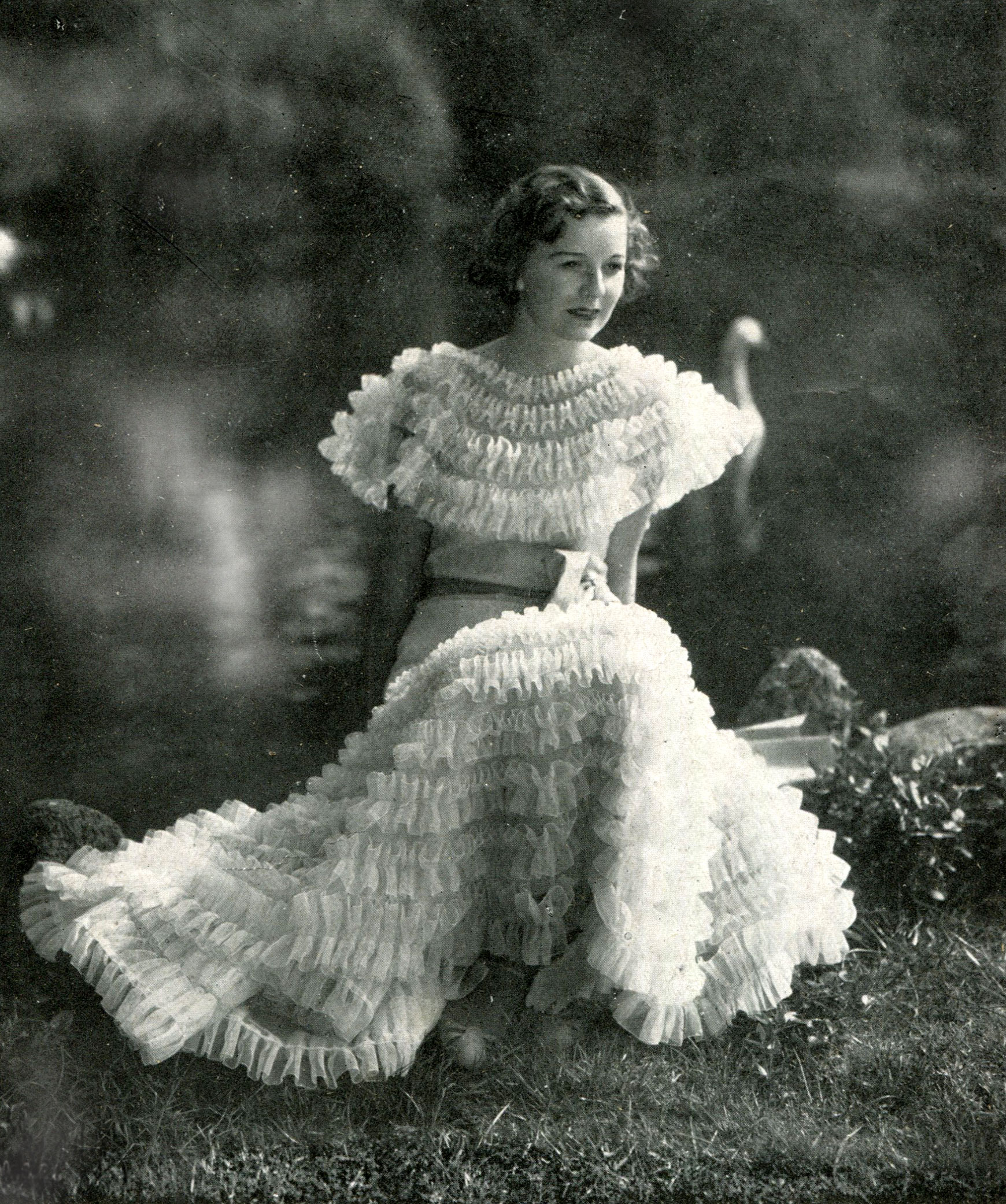 L'attrice Margaret Sullavan in una immagine pubblicata in Italia nel 1934